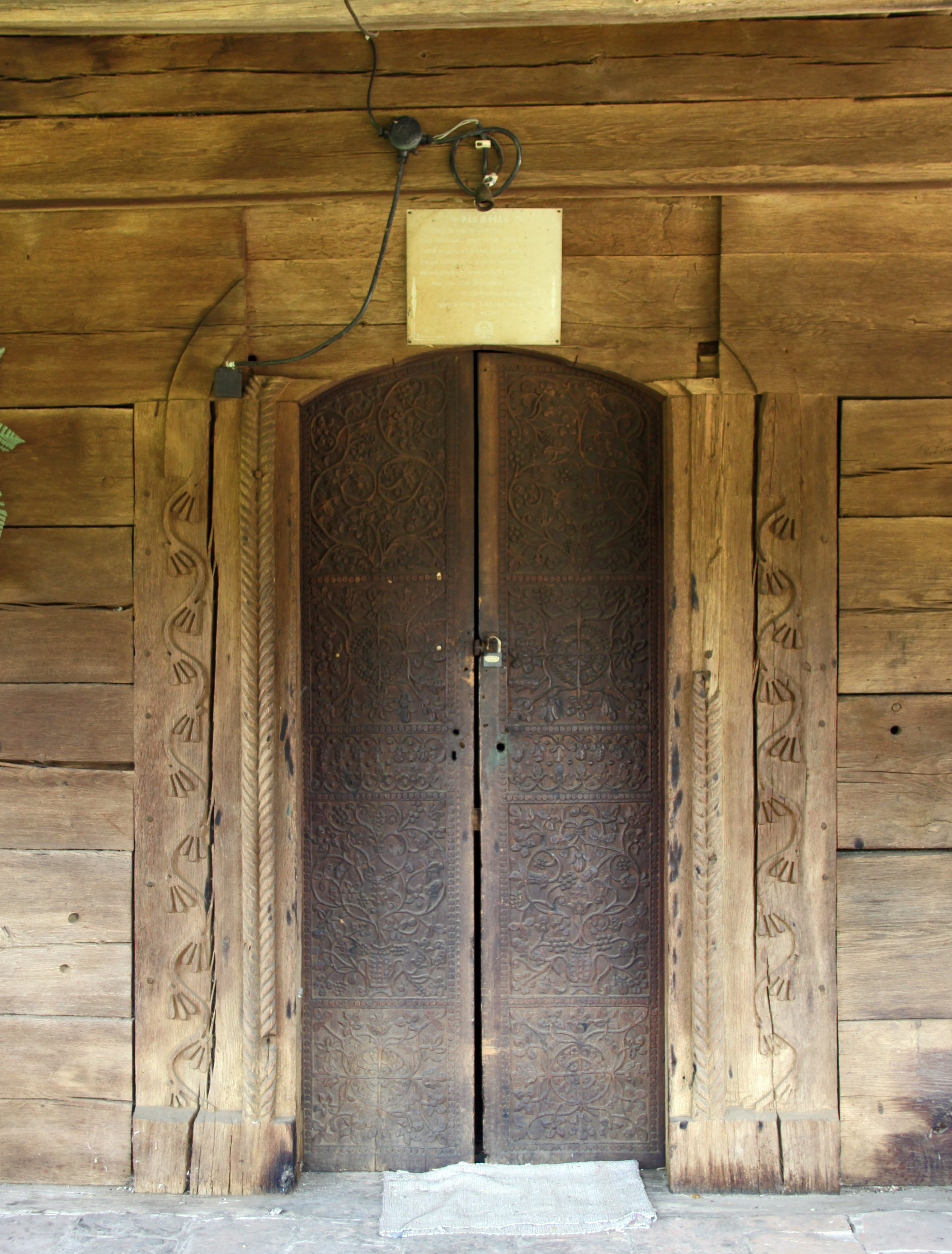 Zătreni, Vâlcea: biserica de lemn, portalul intrării.